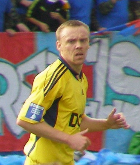 Ukrainischer Fußballspieler Serhij Waliajew während dem Spiel zwischen Arsenal Kyjiw und Metalist Charkiw